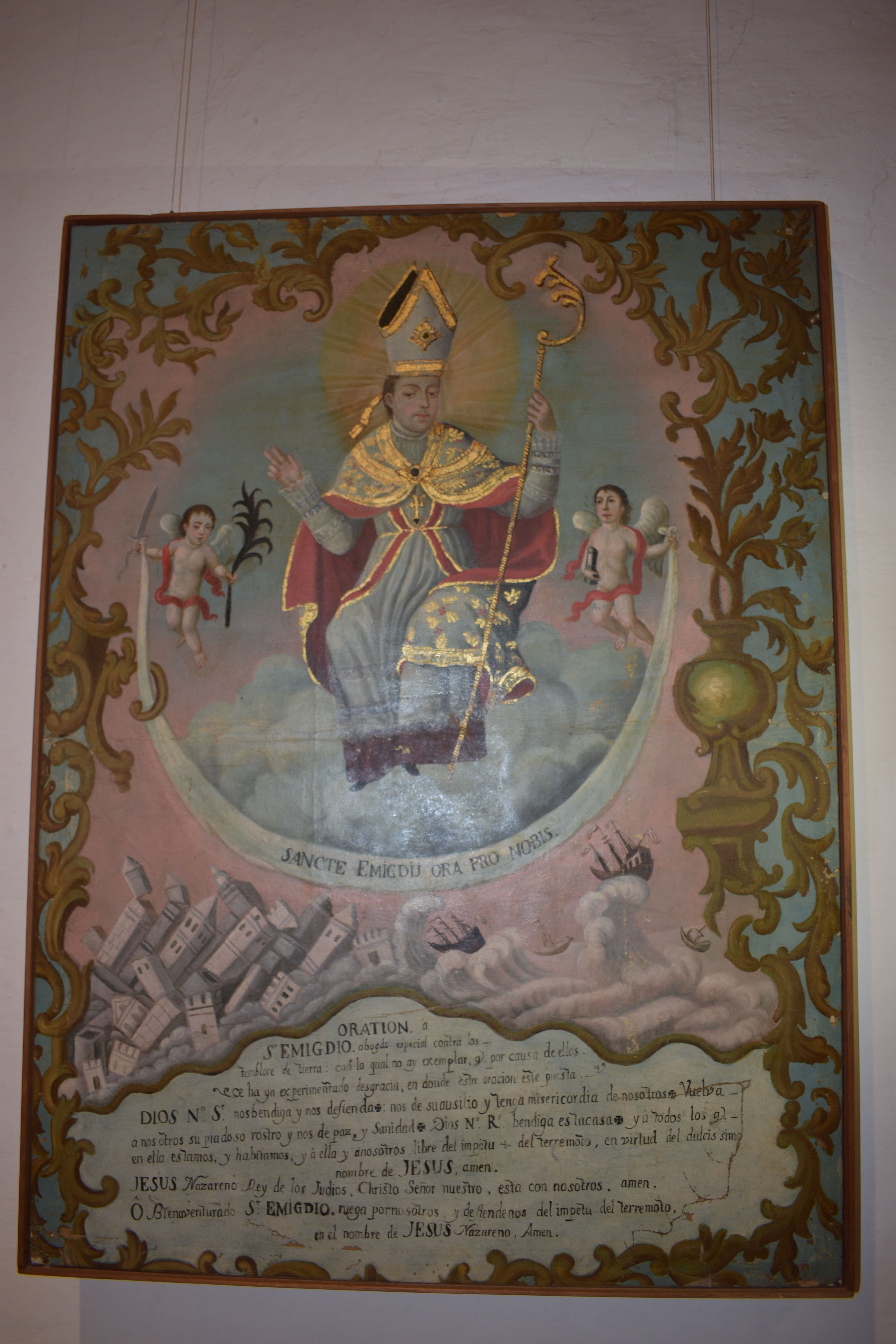 Imagen del Museo de las Conceptas en Cuenca-Ecuador